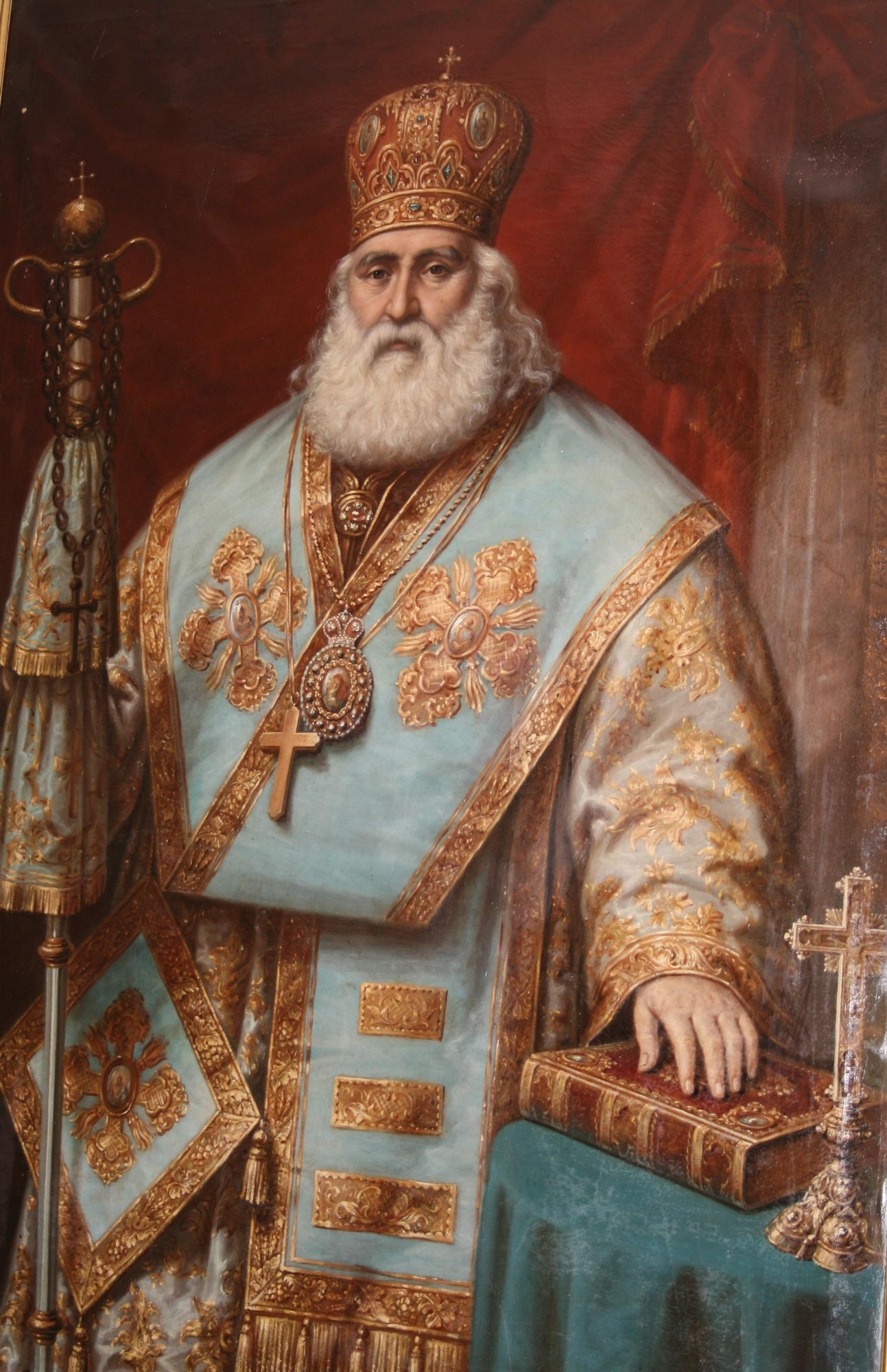 Protopopul Ioan Popazu, pertret realizat de pictorul Mișu Popp